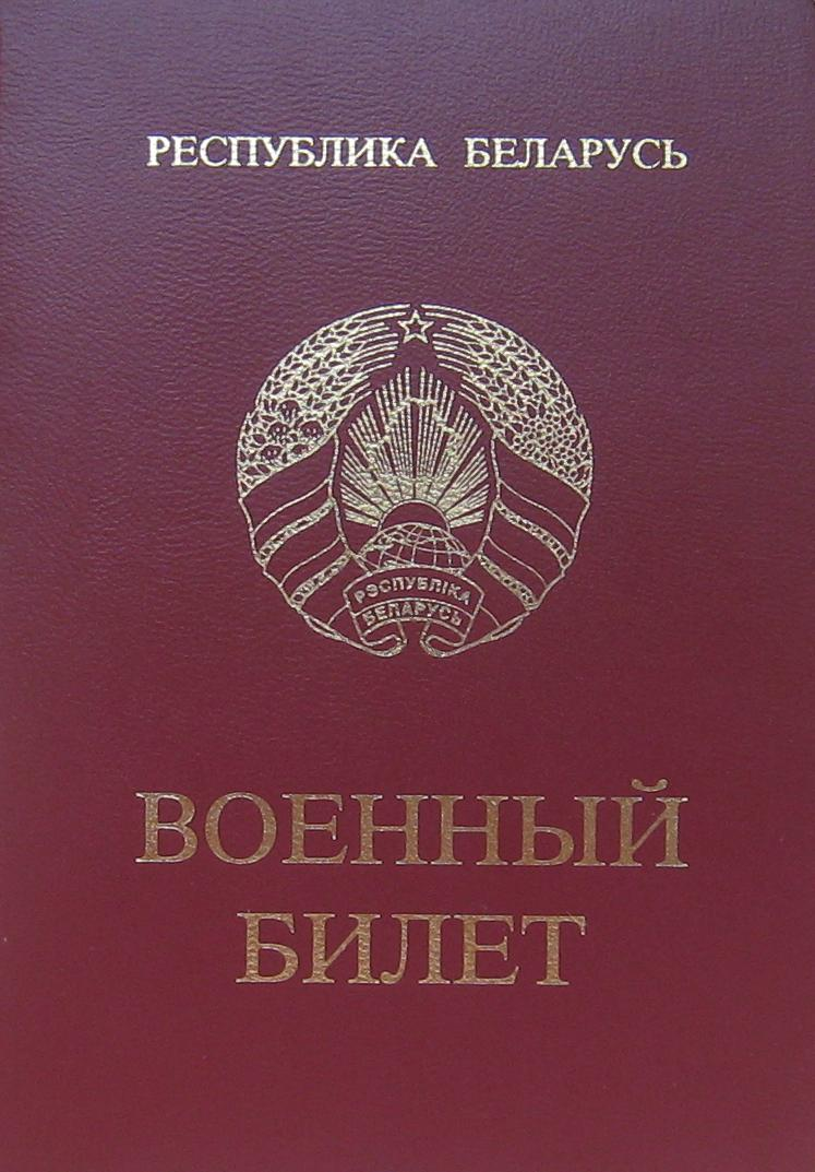 Ваенны квіток. Рэспубліка Беларусь. 2007 год.